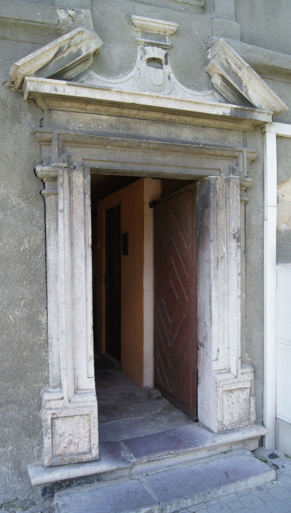 Pińczów - portal z dawnego zamku Myszkowskich